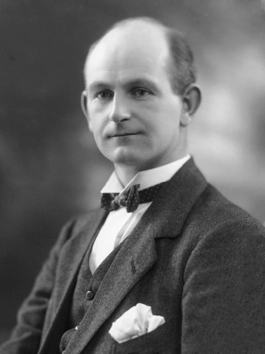 Morgan Jones